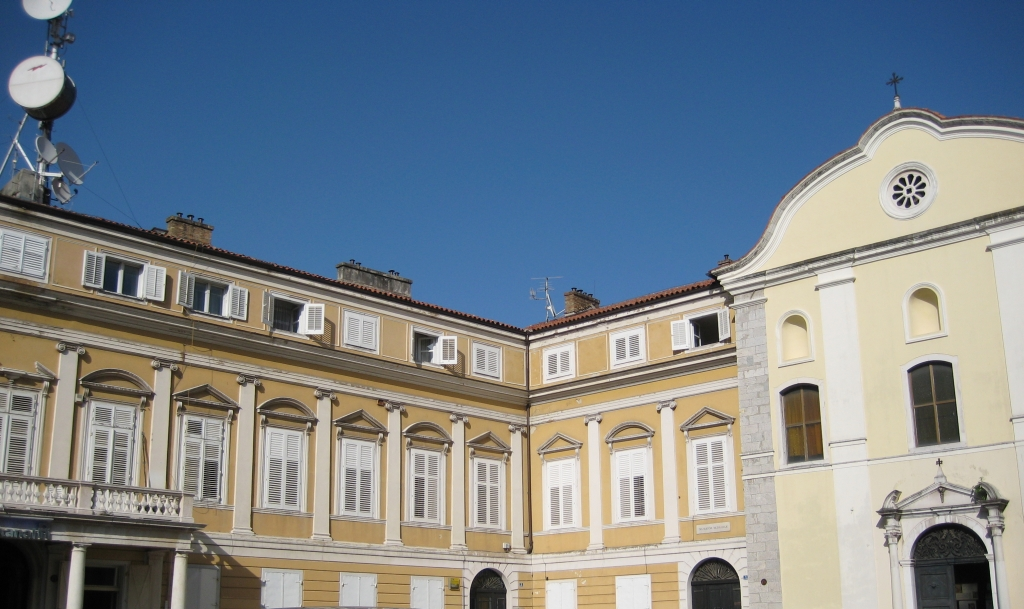 Palača Municipija u Rijeci